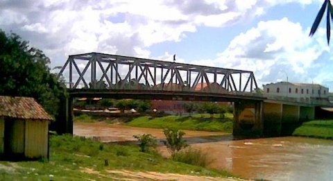 Ponte Francisco Sá, na cidade de Pedreiras/MA. Liga a cidade de Pedreiras - MA à cidade de Trizidela do Vale - MA